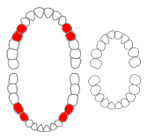 Premolaren rood aangegeven.